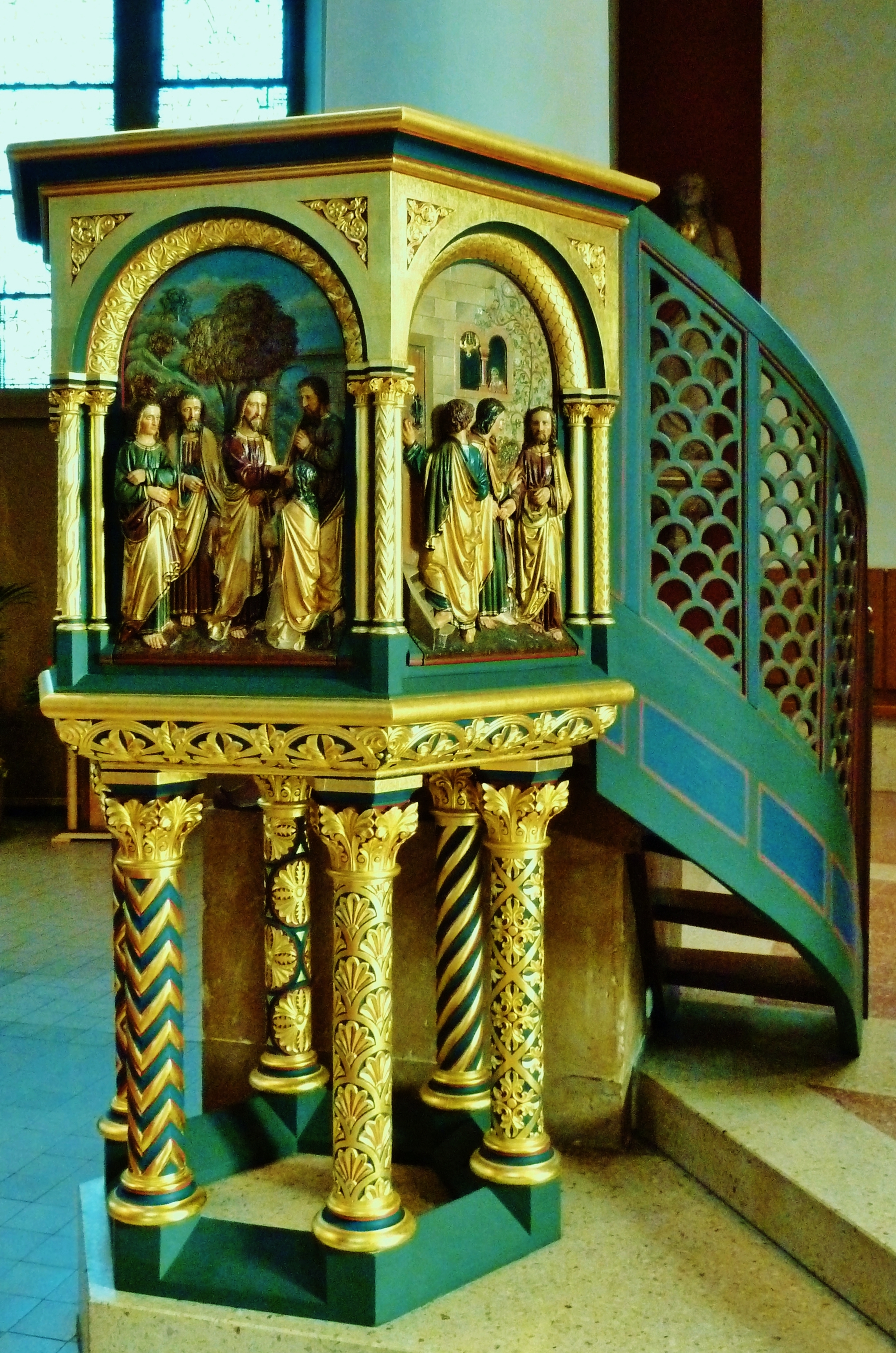 Kanzel der St. Petrus-Kirche in Gesmold